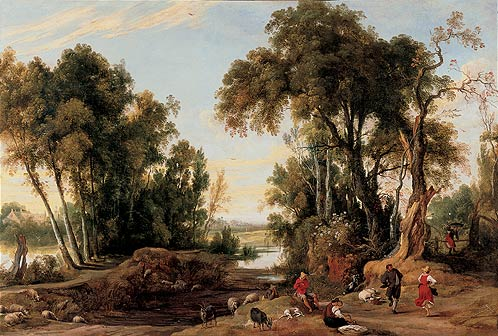 Landschap met dansende herder.